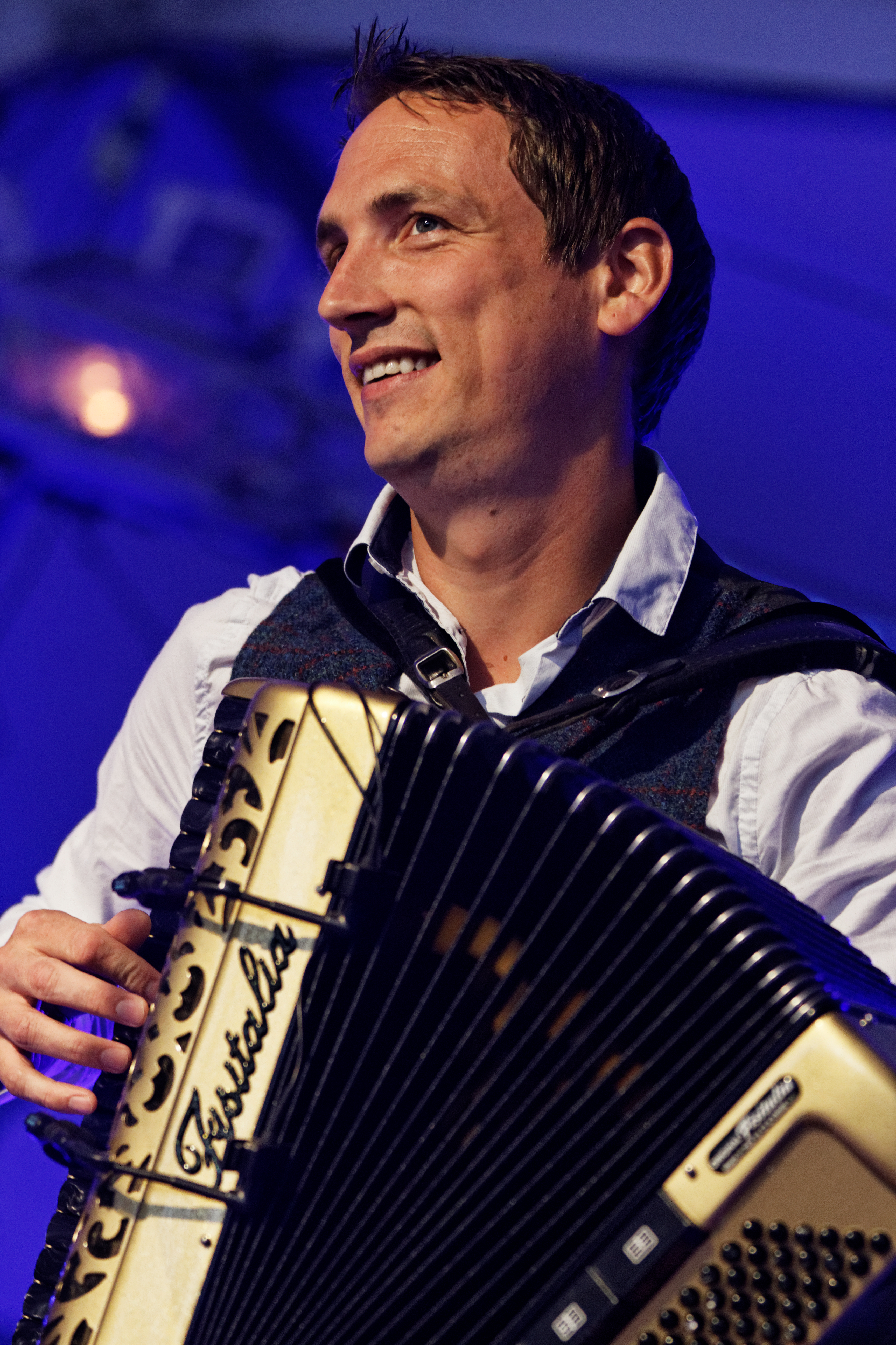 Mànran en concert à l'espace évêché lors du festival de Cornouaille 2013.